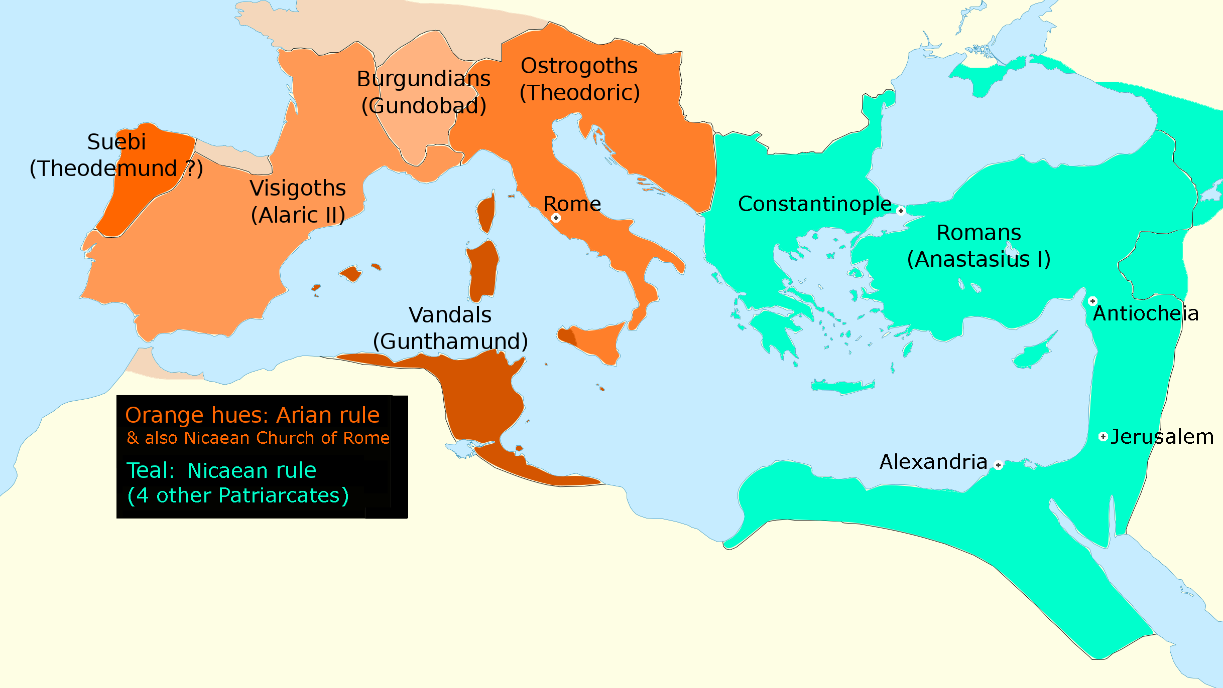 Version corrigée de la carte anachronique Christian_states_495_AD_(en).svg [1]